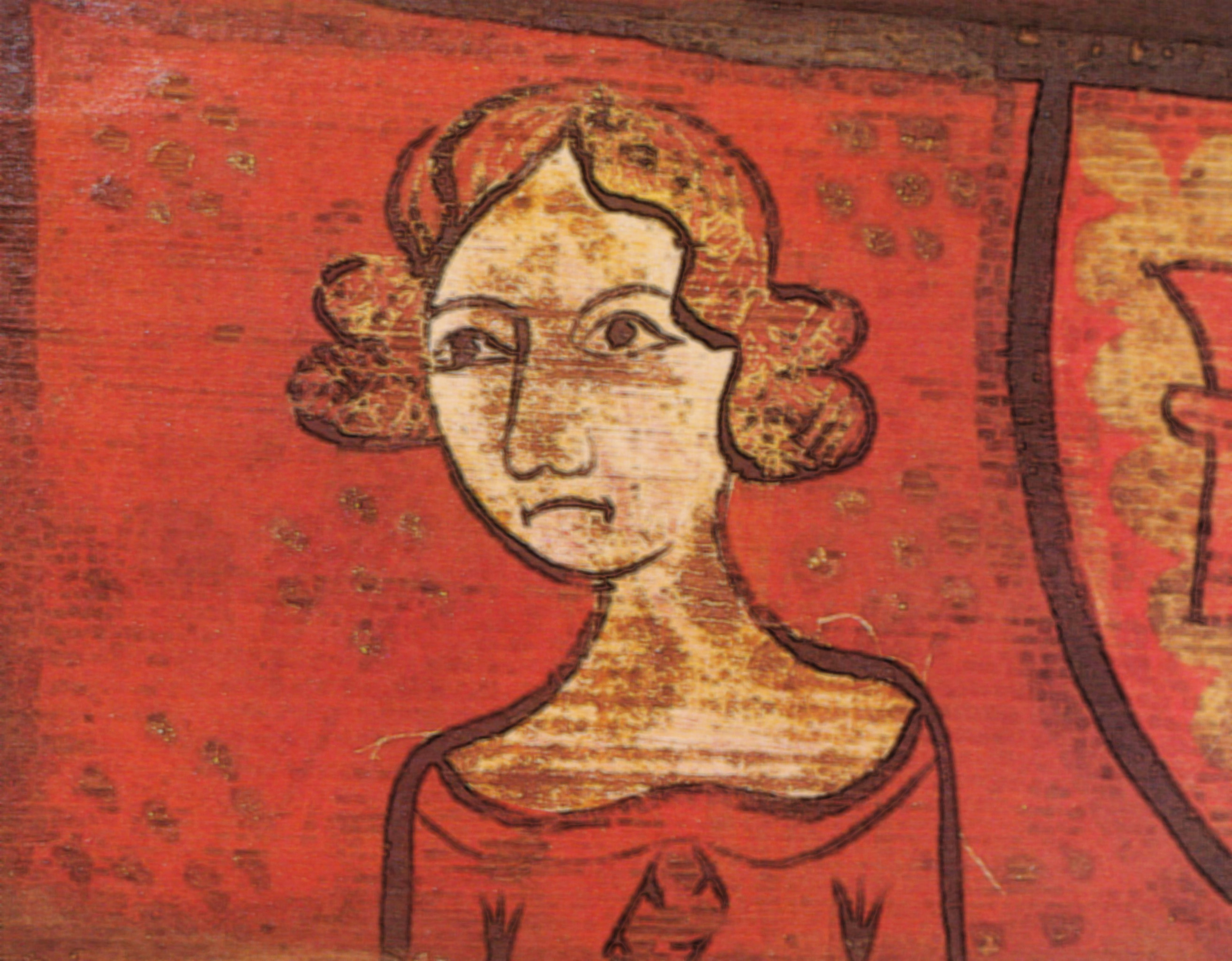 Portrait de femme (Isabeau de Bavière ?), dans la Maison des Chevaliers de Pont-Saint-Esprit en 1450